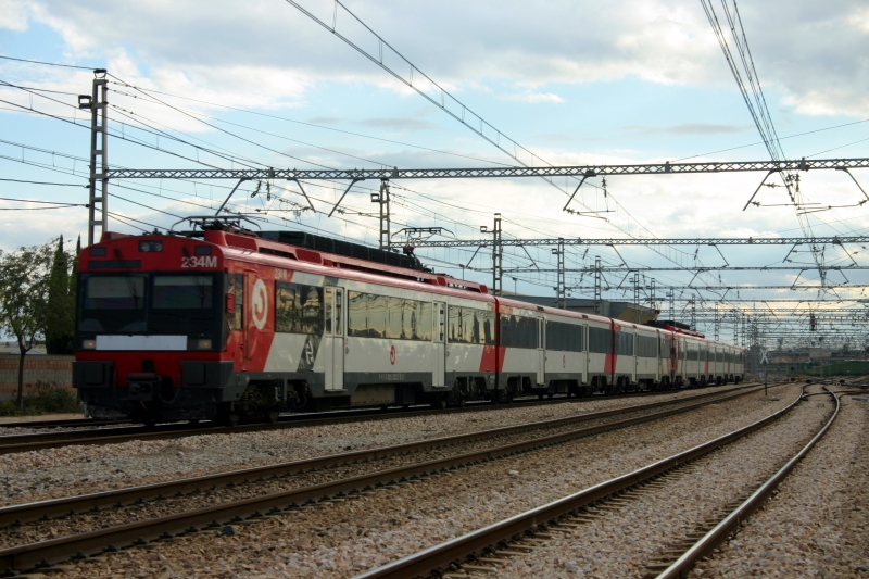 Renfe EMU 440 Refurbished in travel from l'Alcúdia de Crespins to València-Nord passing entering to Silla (València)